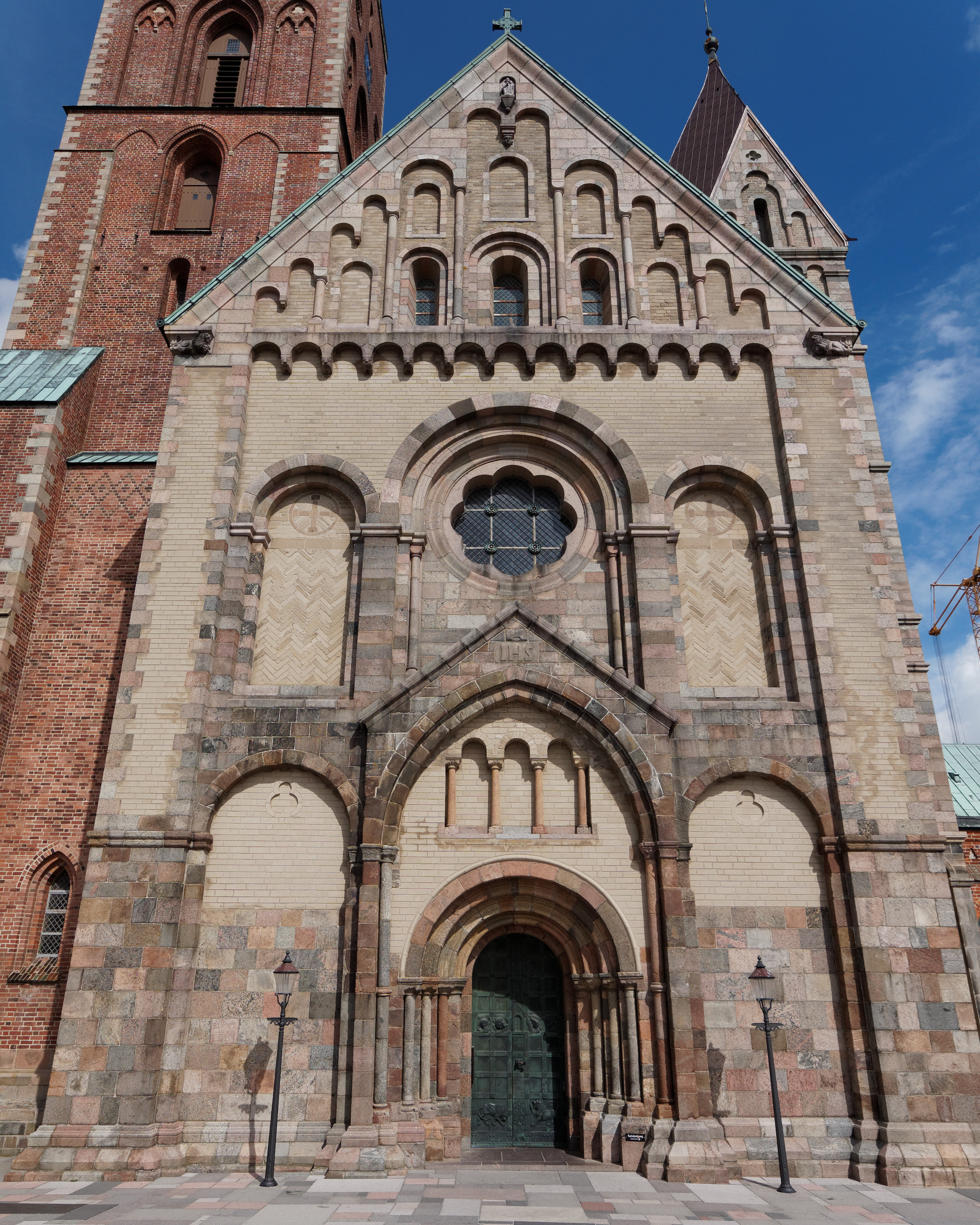 romanischer Westgiebel und das Westportal des Doms zu Ribe, Jütland, Dänemark, Ansicht von Westen